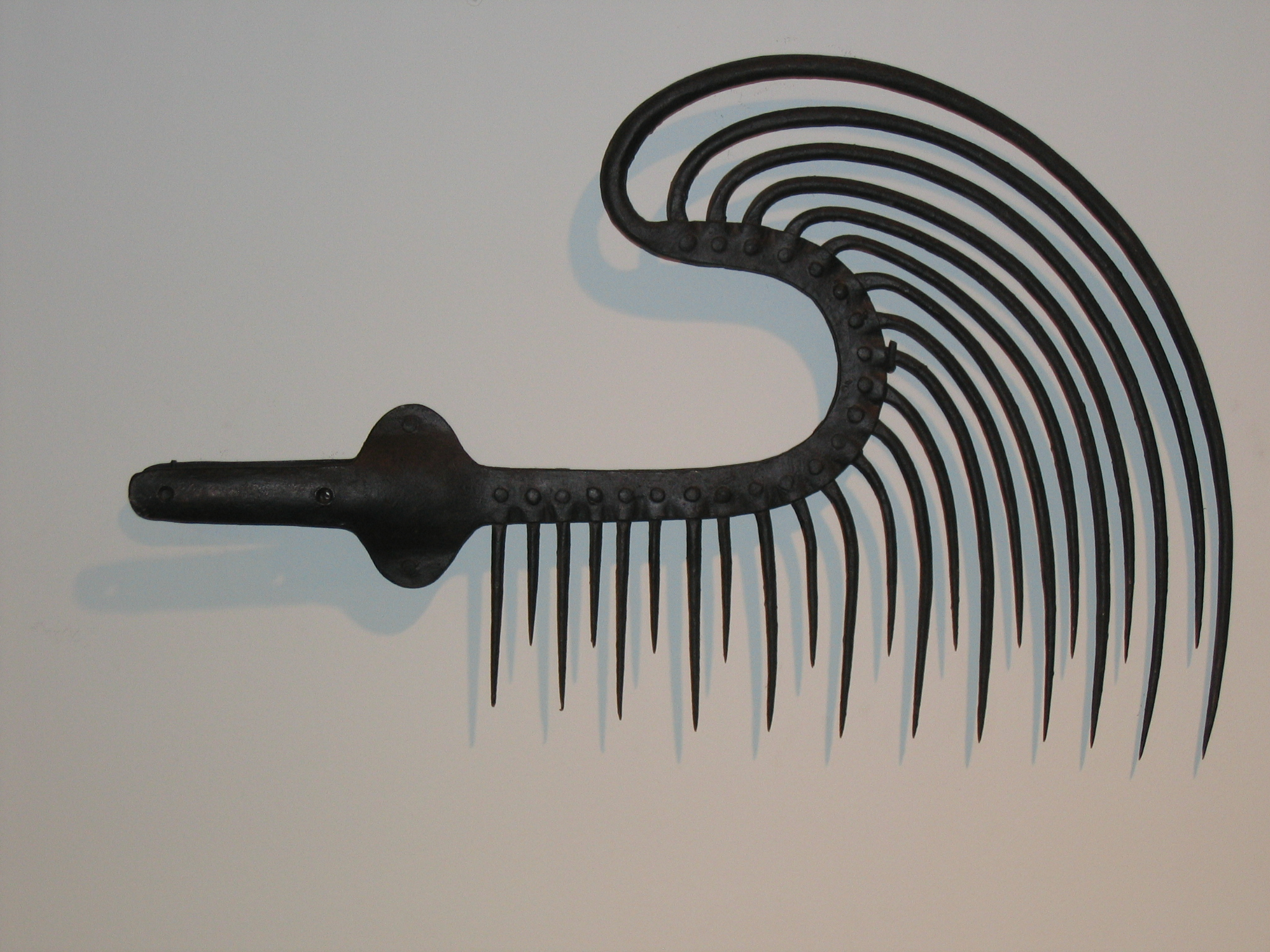 Aalharke aus dem 19. oder frühen 20. Jahrhundert. Fischfanggerät zum Aalfang. Fotografiert im Altonaer Museum.